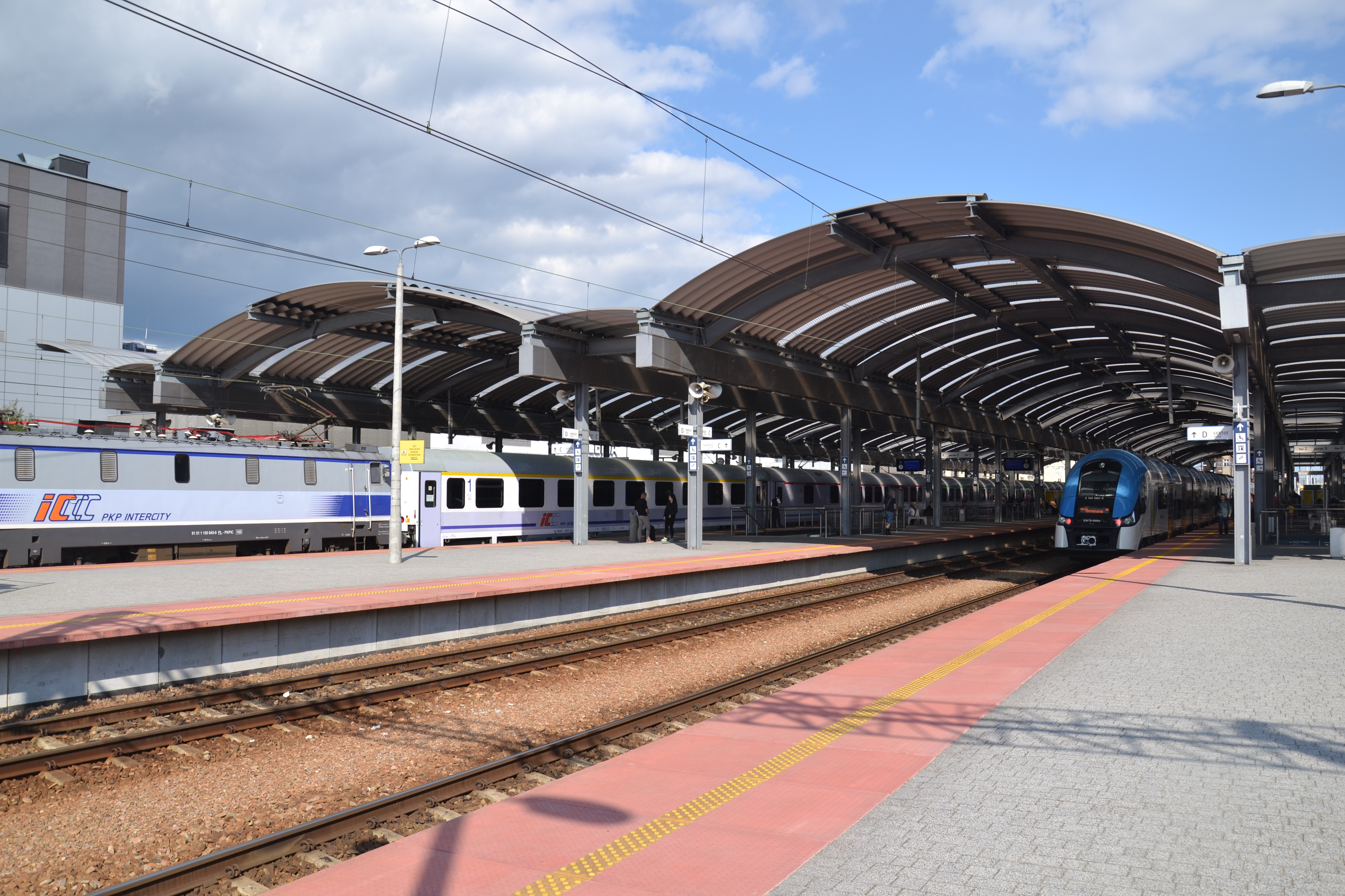 Widok dworca kolejowego w Katowicach